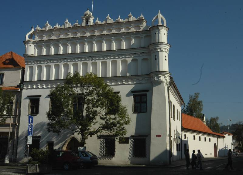 Das Böhmerwald-Museum auf dem Hauptplatz von Susice